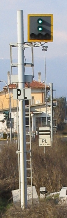 Segnale di protezione di un passaggio a livello, disposto a via libera